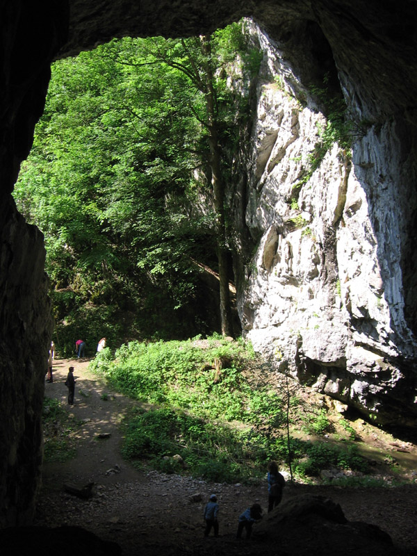 Býčí skála (na fotce se nachází vpravo)